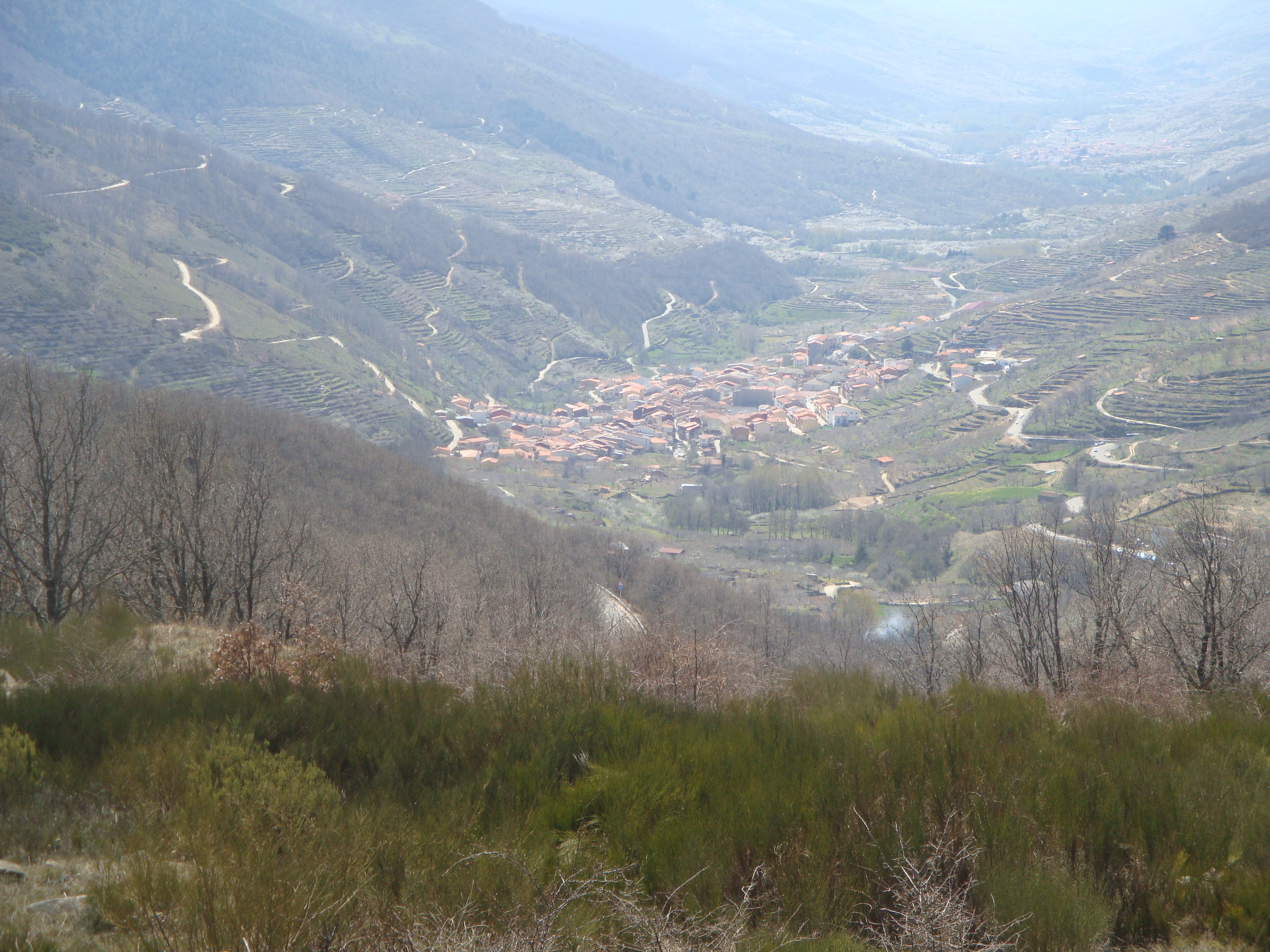 Vista de Tornavacas (Cáceres) desde el puerto del mismo nombre